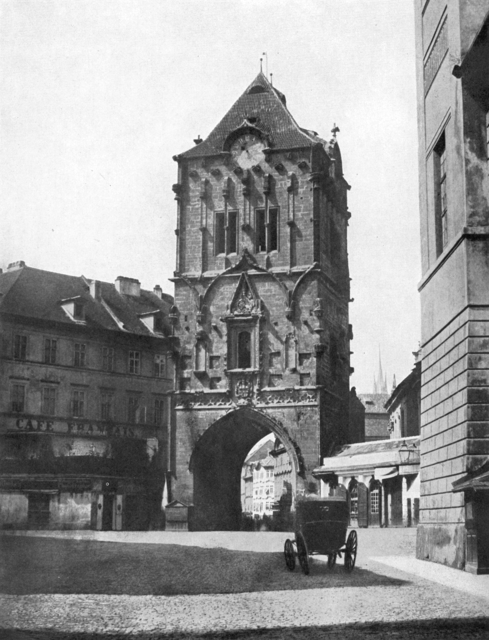 A. Groll - Prašná brána v Praze, 1856